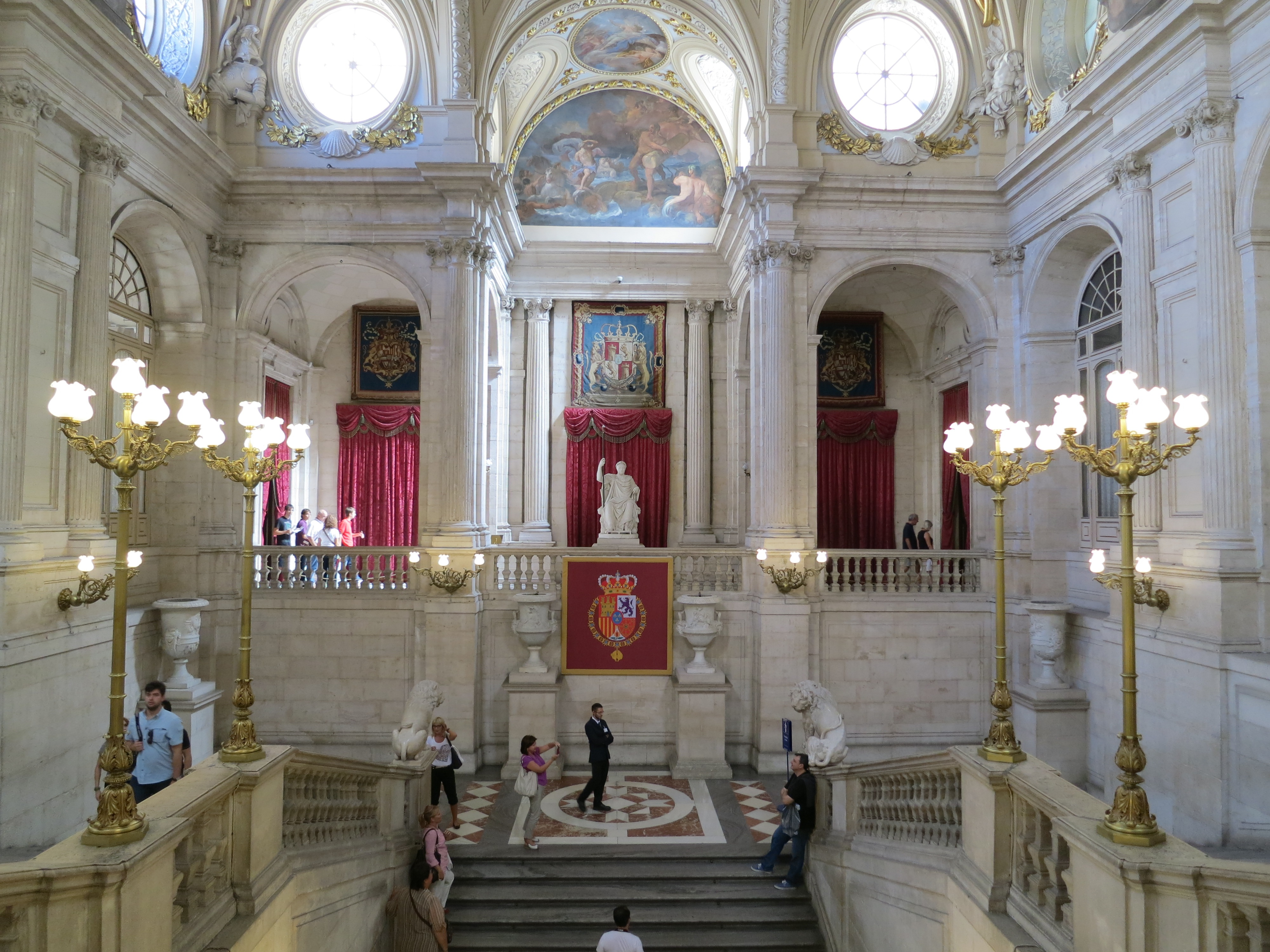 Palacio Staircase